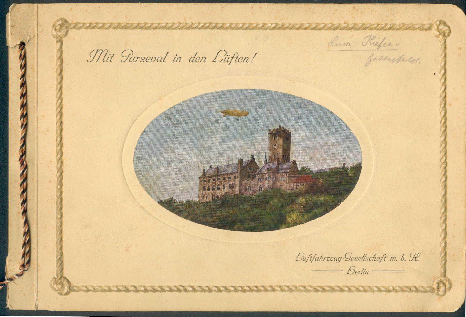 Luftfahrzeug-GmbH(Parseval) Broschuere Titelblatt